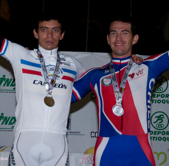 El podio de la persecución individual Campeonato Panamericano de Ciclismo de Pista, Medellín. 2 de mayo de 2011.